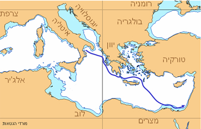 אוניית המעפילים מורדי הגטאות - מסלול